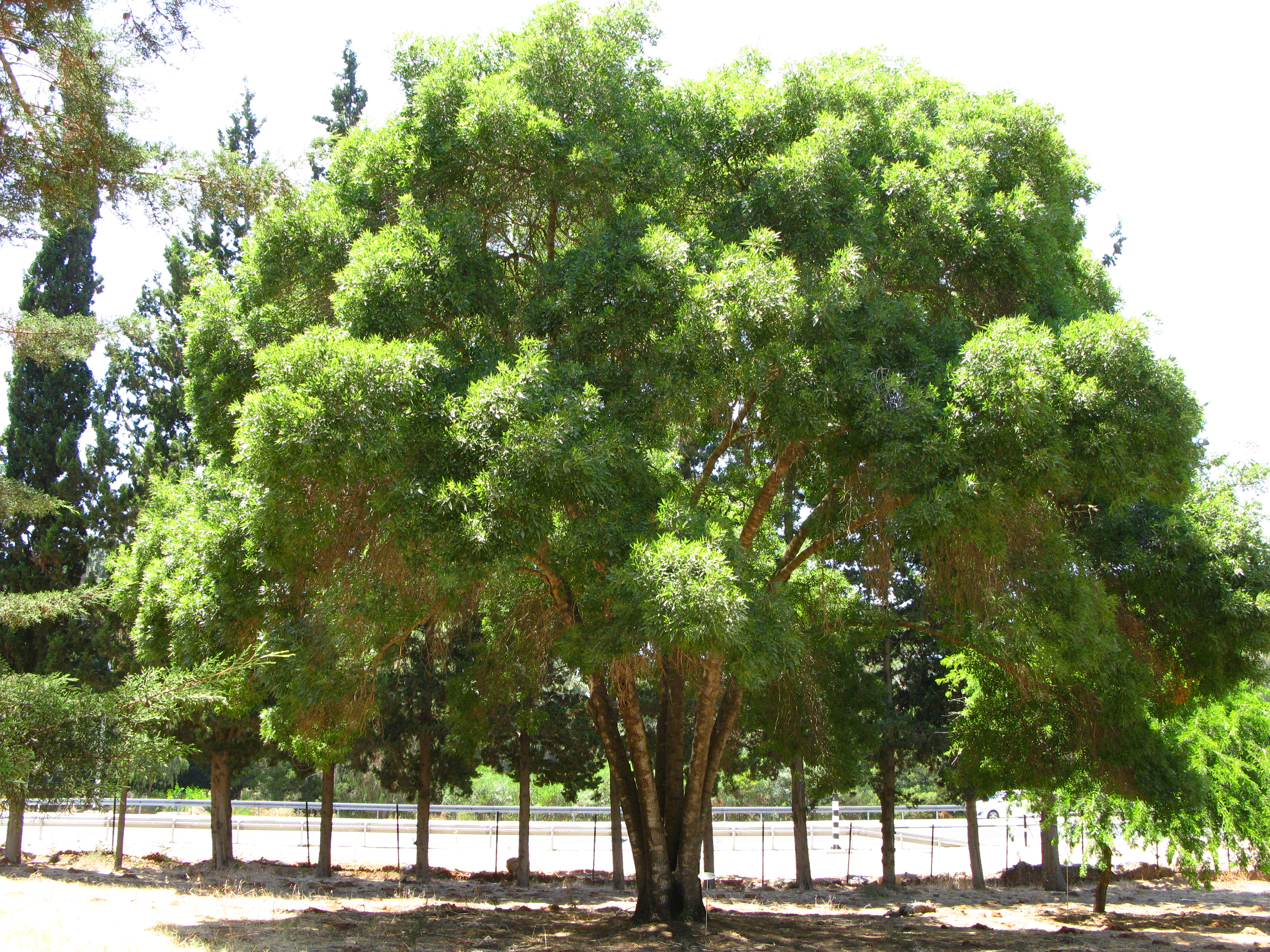 מילה סורית ביער אילנות ישראל